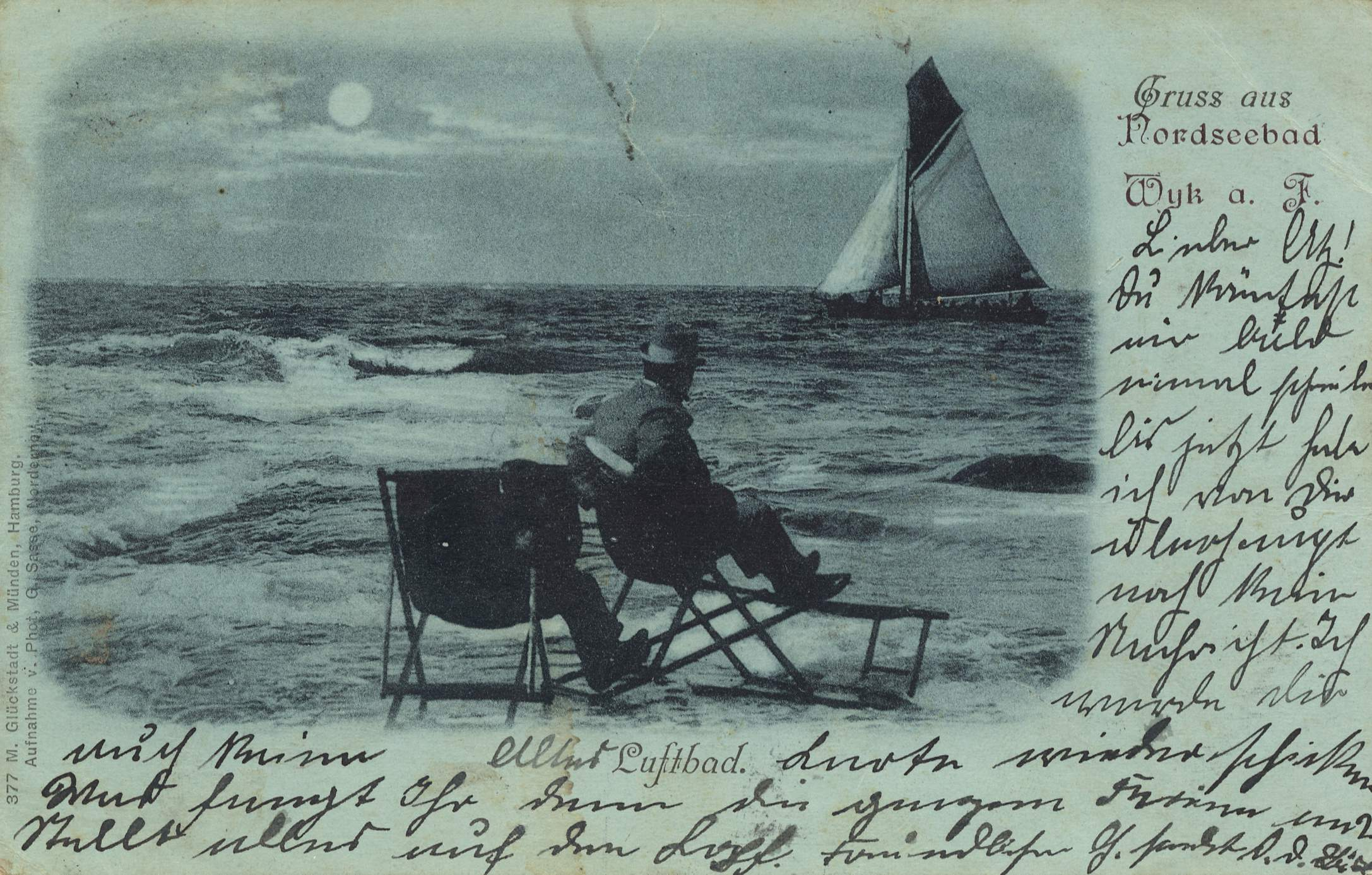 Sogenannte Mondscheinkarte nach einer Aufnahme des ab den 1890er Jahren auf Norderney dauerhaft niedergelassenen Fotografen Gottfried Sasse (der „Porträtist von Nordeney“), um 1898 im Lichtdruck vervielfältigt für den in Hamburg sitzenden Ansichtskartenverlag M. Glückstadt & Münden. Die Karte ist mit der fortlaufenden Nummer 377 markiert ...